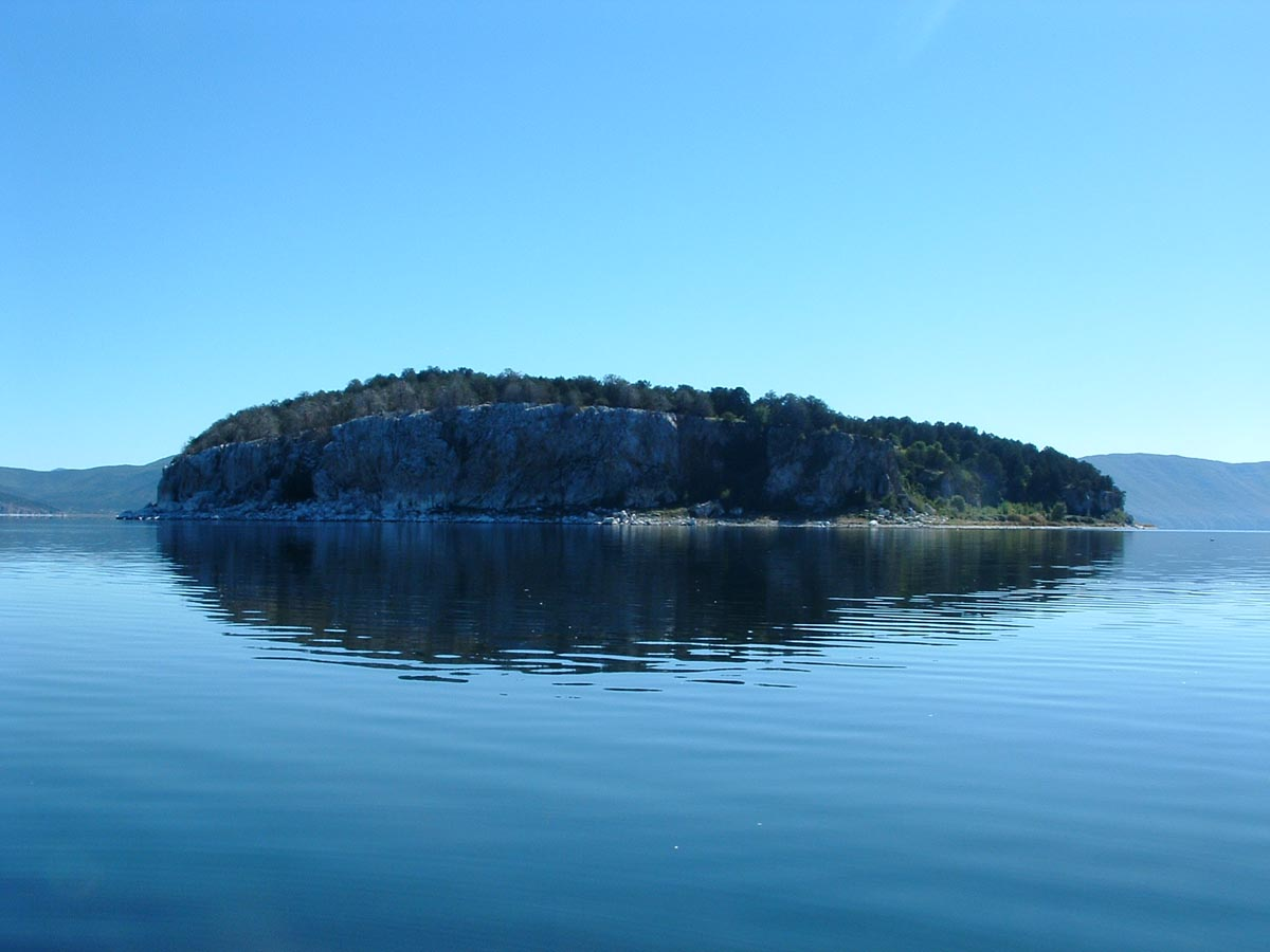 Островот во Преспанското езеро (наречен Змиски Остров или Голем Град) каде што некогаш се наоѓале тврдината и замокот на Цар Самуил. Фотографирала: Ирена Божовиќ